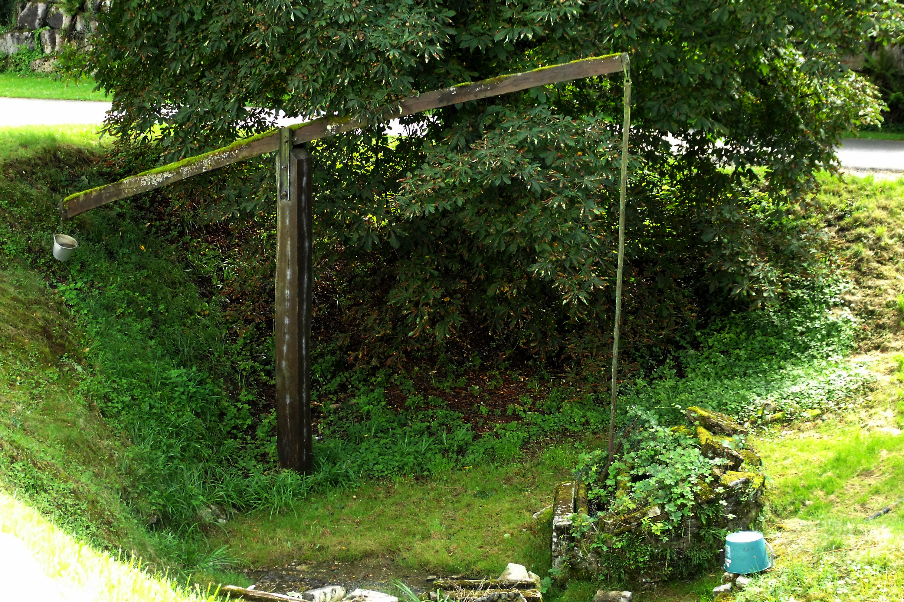 Puits à Bretigney, Doubs, France